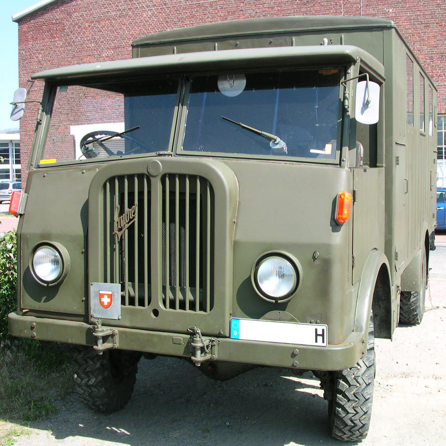 Willich, Borgward-Treffen im LKW-Museum, Saurer Militär-LKW